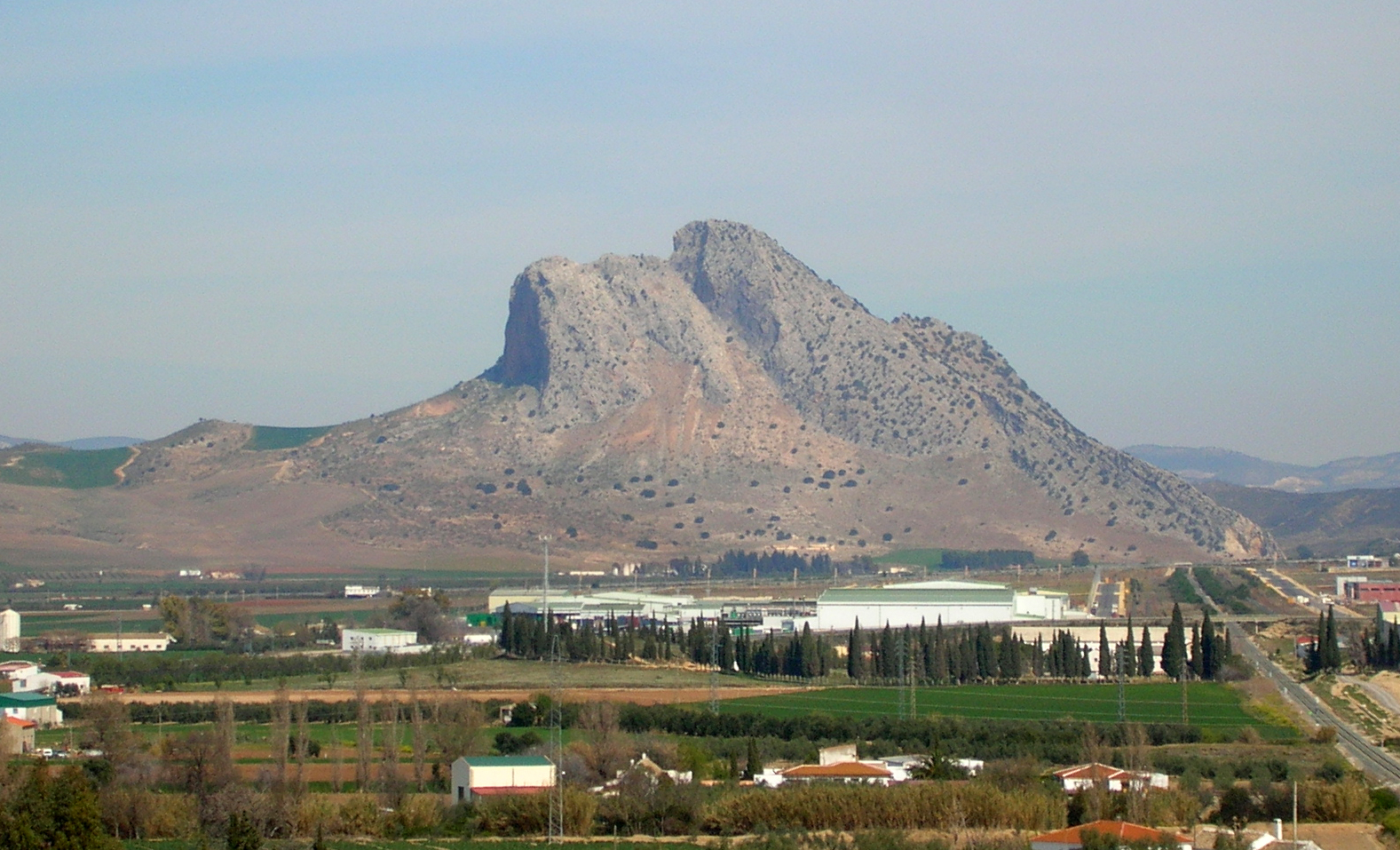 Peña de los Enamorados, ou Rocher des Amoureux, commune d'Antequera, Andalousie (Espagne)